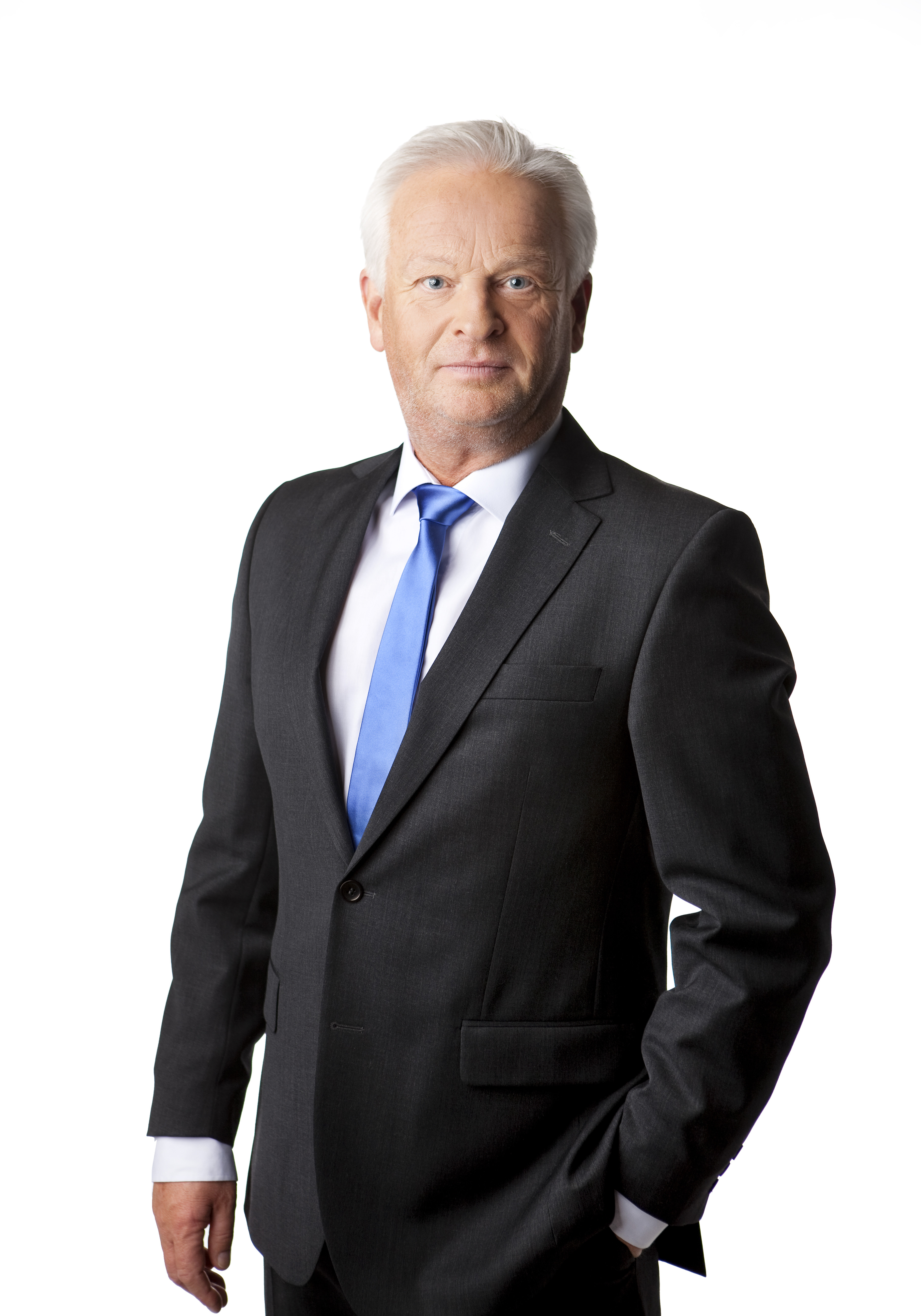 Fotbollstränaren och expertkommentatorn Hasse Backe.